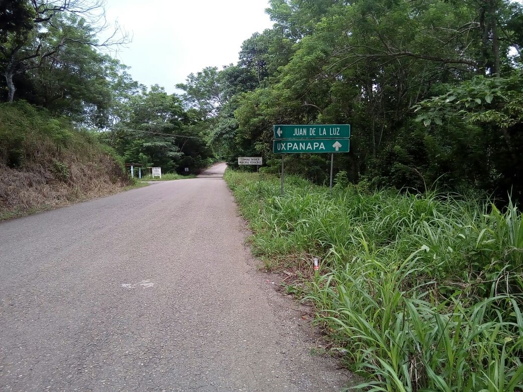 Paso del Tigre, la entrada a Juan de la luz Enriquez Jesus Carranza Veracruz